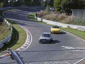 Anfahrt Bruennchen